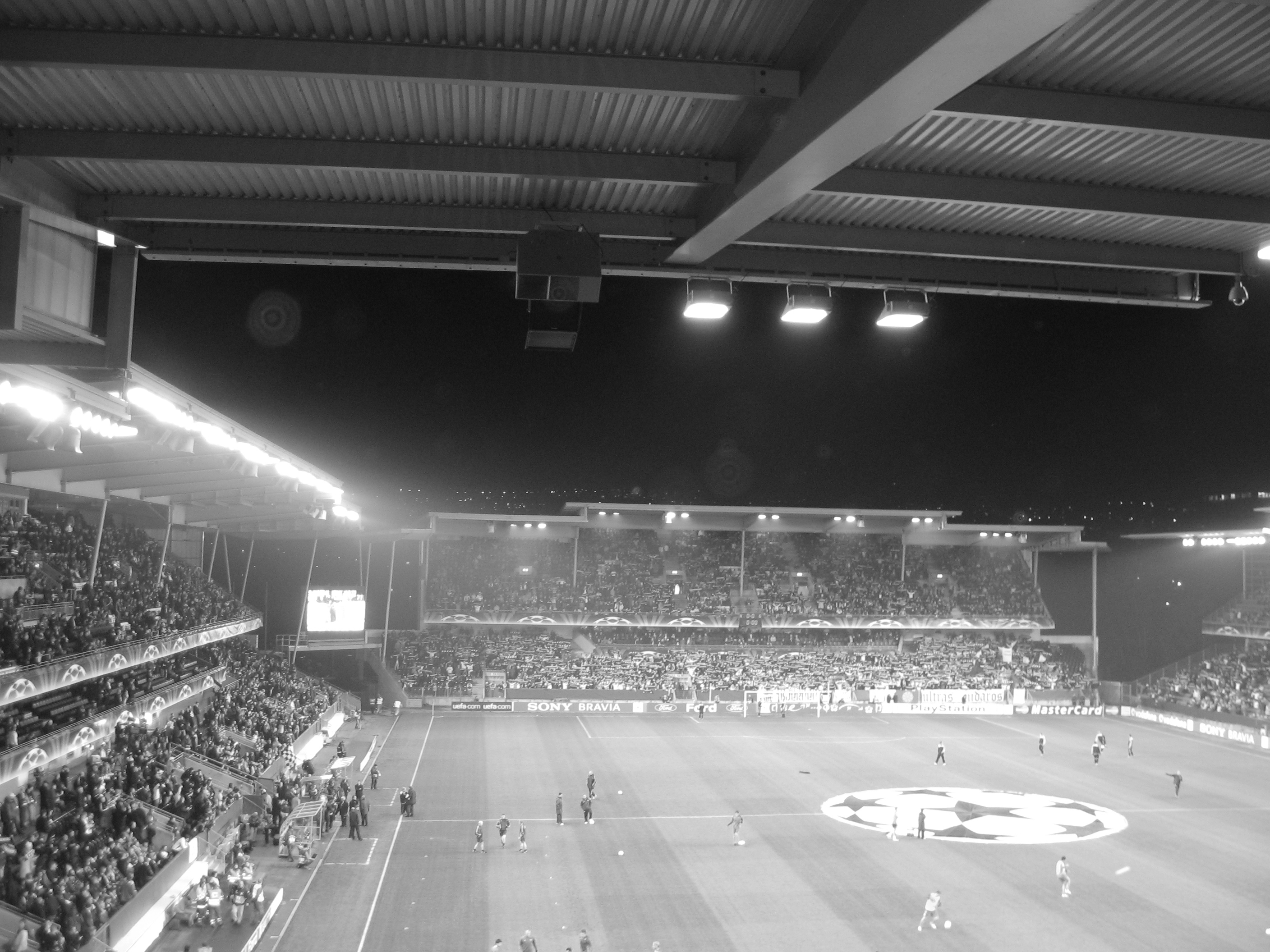 RBK - Valencia (2-0, 24/10/2007)